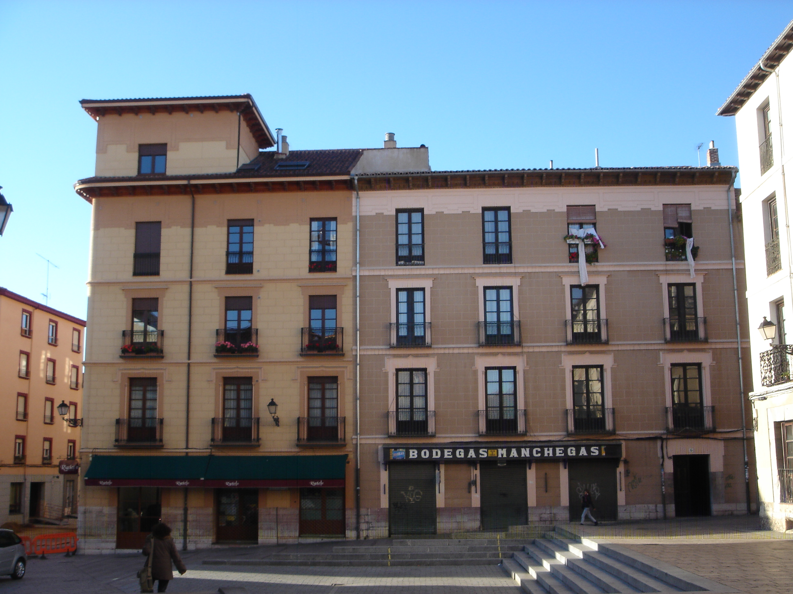 edificio construido sobre el palacio